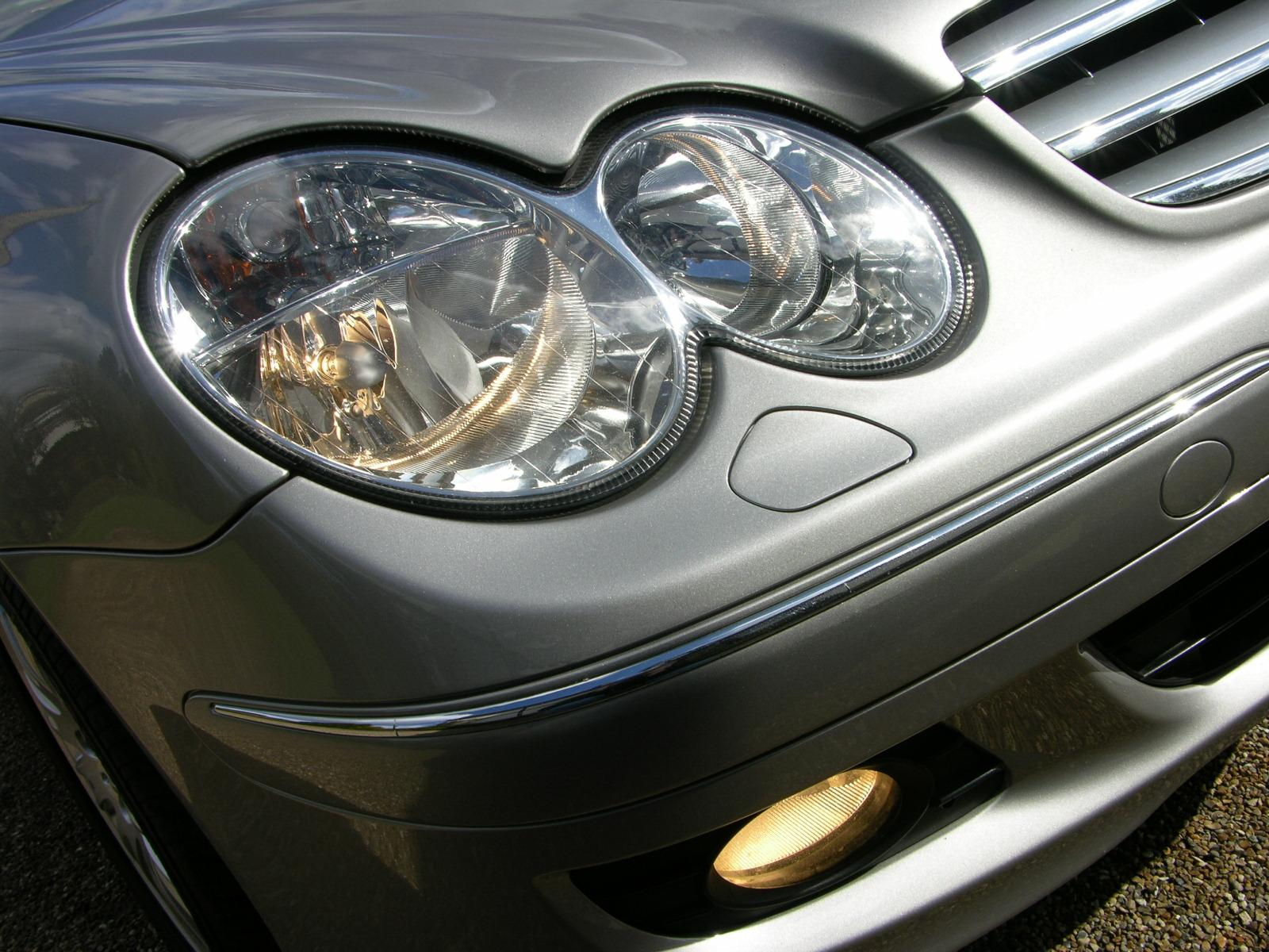 Mercedes Benz CLK 200 Kompressor